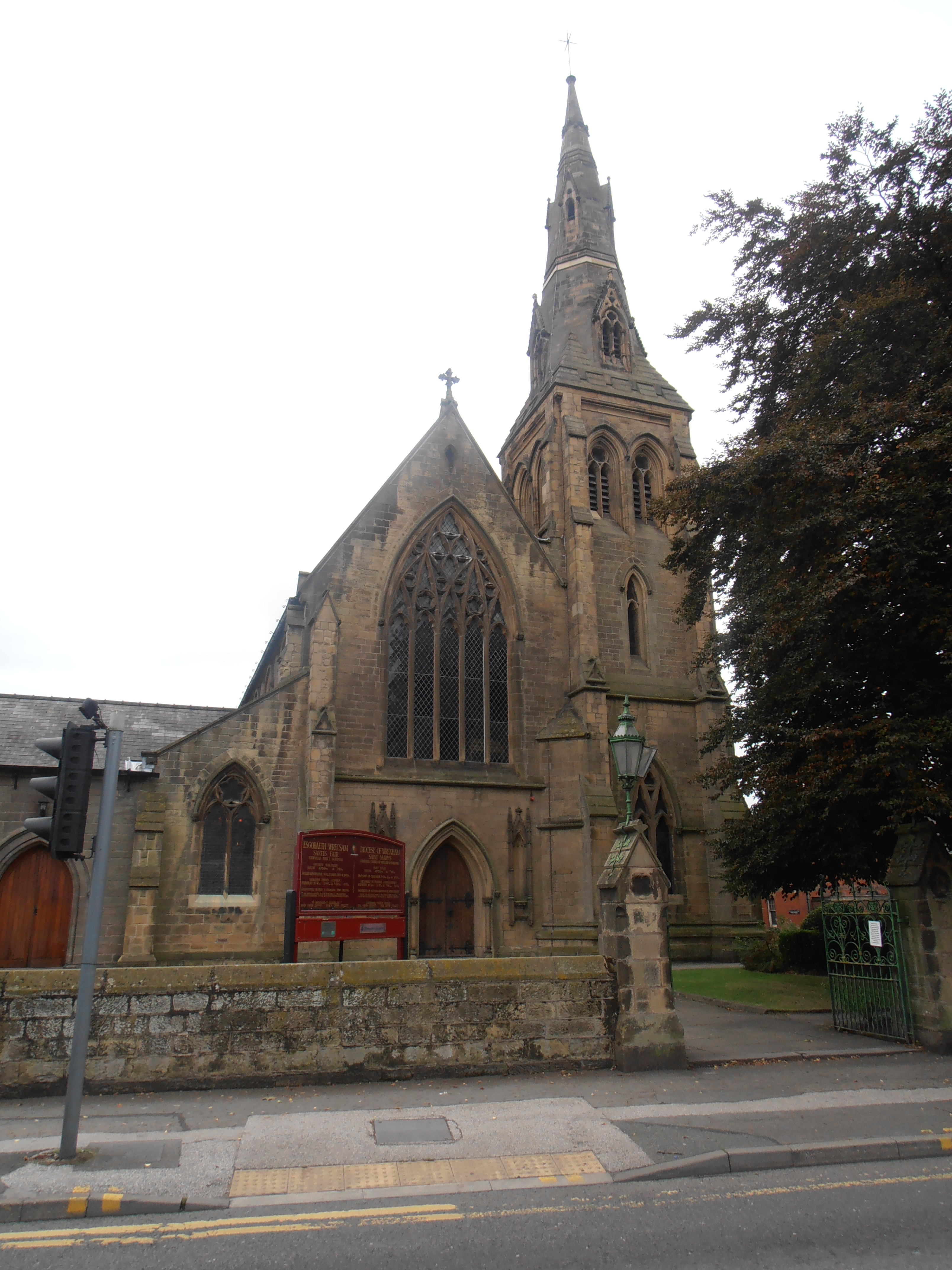 Eglwys Babyddol Wrecsam a elwir weithiau'n "Gadeirlan".